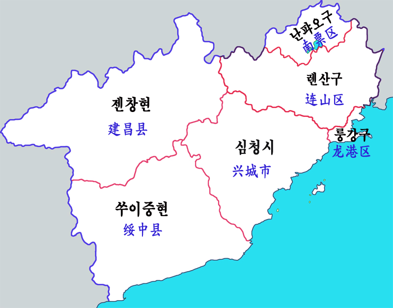 후루다오시 현급구역